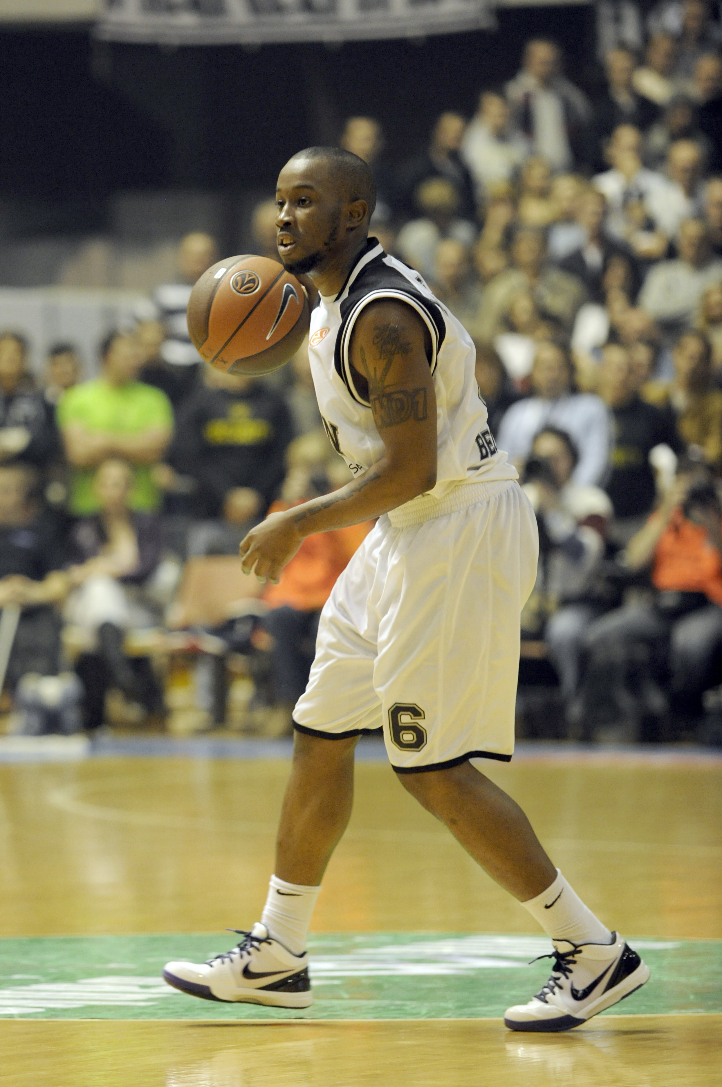 _DSC8081